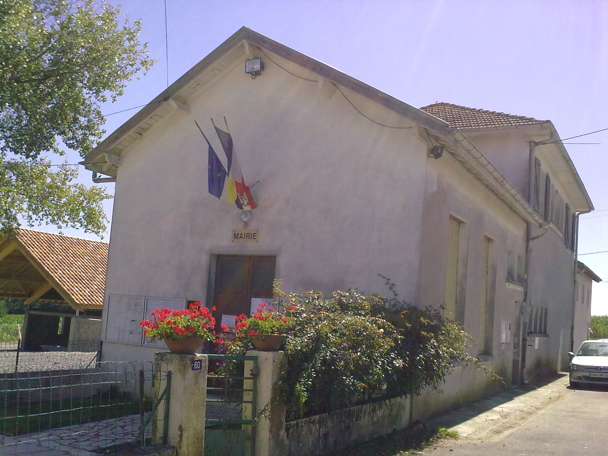 Labeyrie (Pyrénées-Atlantiques) le 18 juillet 2010, France.